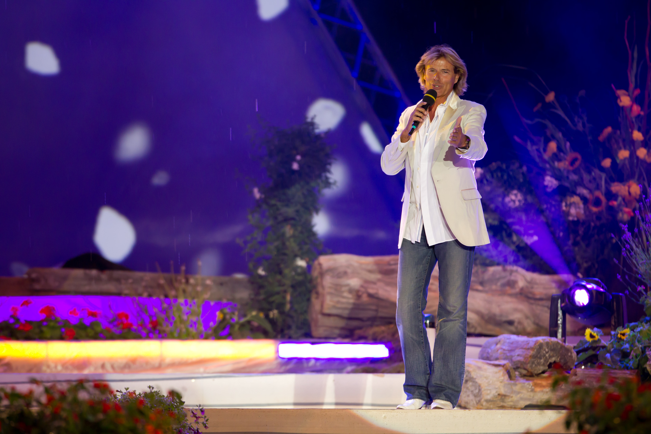 Wenn die Musi spielt - Sommer Open Air